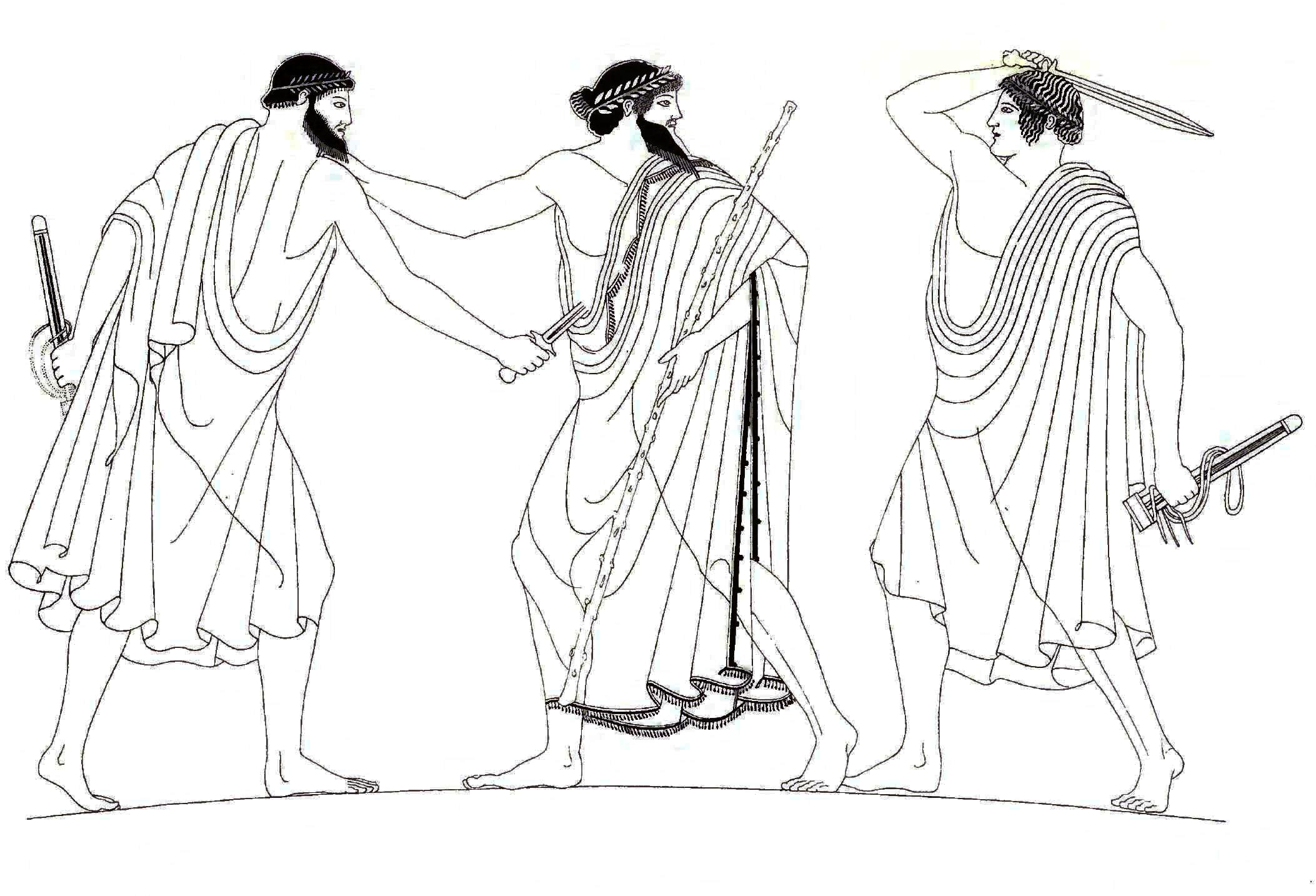 Die Ermordung des Hipparchos. Attischer Stamnos. Martin von Wagner Museum